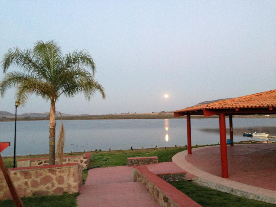 ubicado en El Salto, Municipio de Valle de Guadalupe, Jalisco.